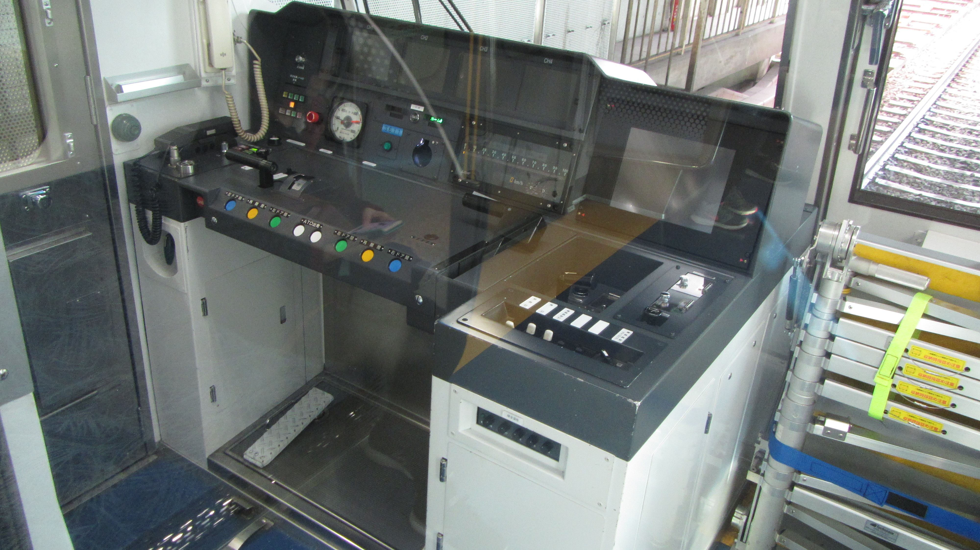 横浜市営地下鉄3000V形の運転台です